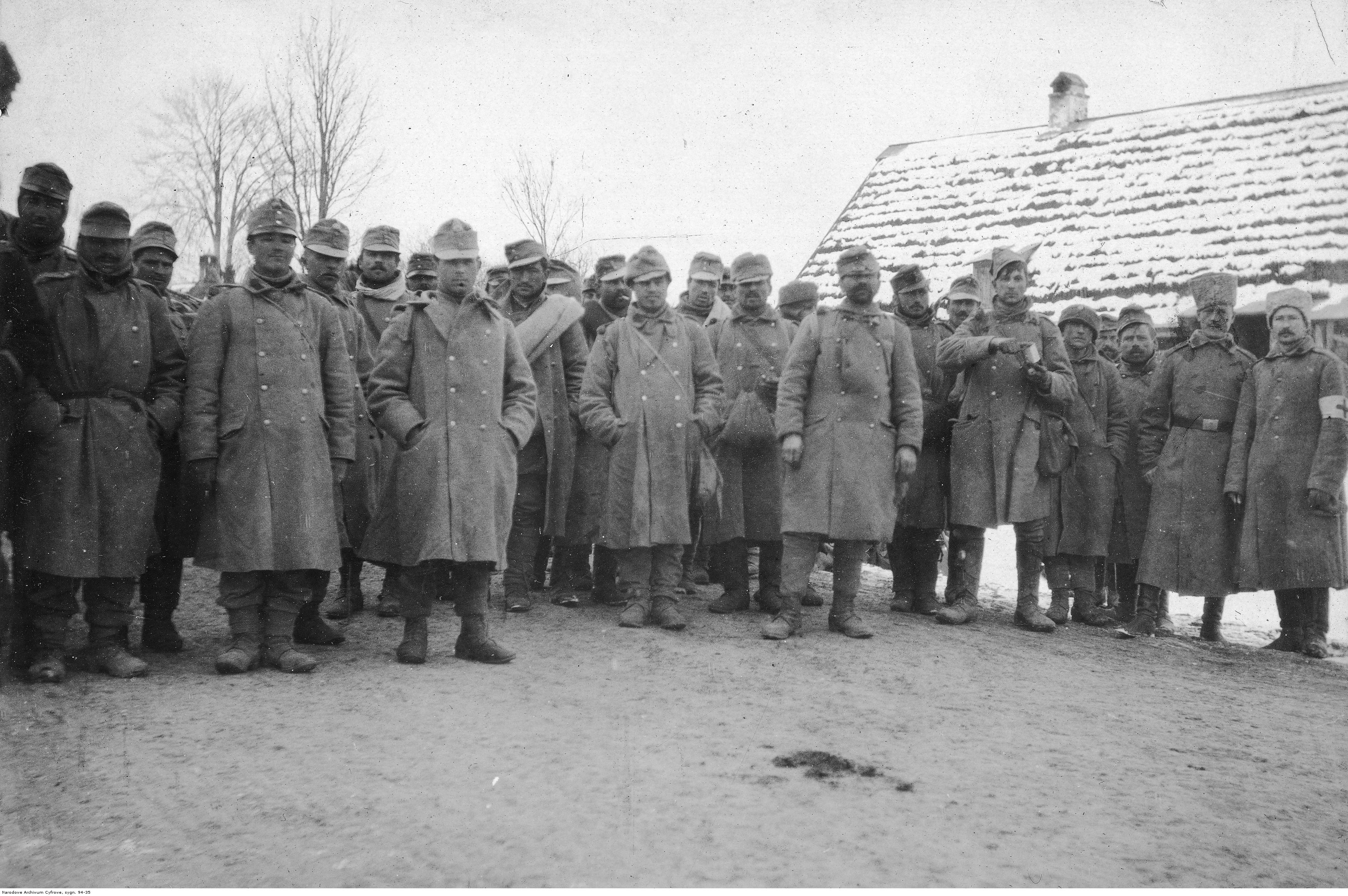 Grupa jeńców pod strażą Rosjan.